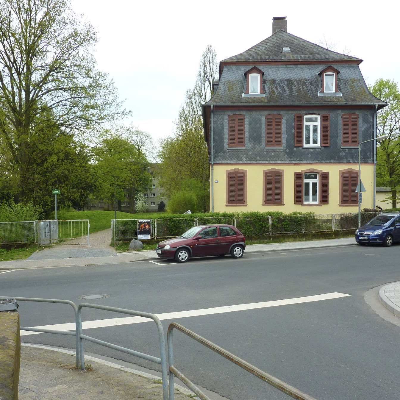 Frankfurt am Main, Stadtteil Unterliederbach: Der Graubnerpark ist eine öffentliche Grünanlage im Norden des Stadtteils. Der Park ging aus einem 1817 eingerichteten privaten Landschaftspark hervor. Die Stadt Höchst am Main, seit 1928 Frankfurt-Höchst, kaufte die Liegenschaft gleichzeitig mit der Eingemeindung Unterliederbachs nach Höchst im Jahr 1917 auf und widmete das Grundstück in einen öffentlichen Park um. Das Foto zeigt die im Jahr 1755 als Herrenhaus erbaute Graubnersche Villa am Nordrand des Parks. Ansicht von Norden, quer im Vordergrund verlaufend die Liederbacher Straße